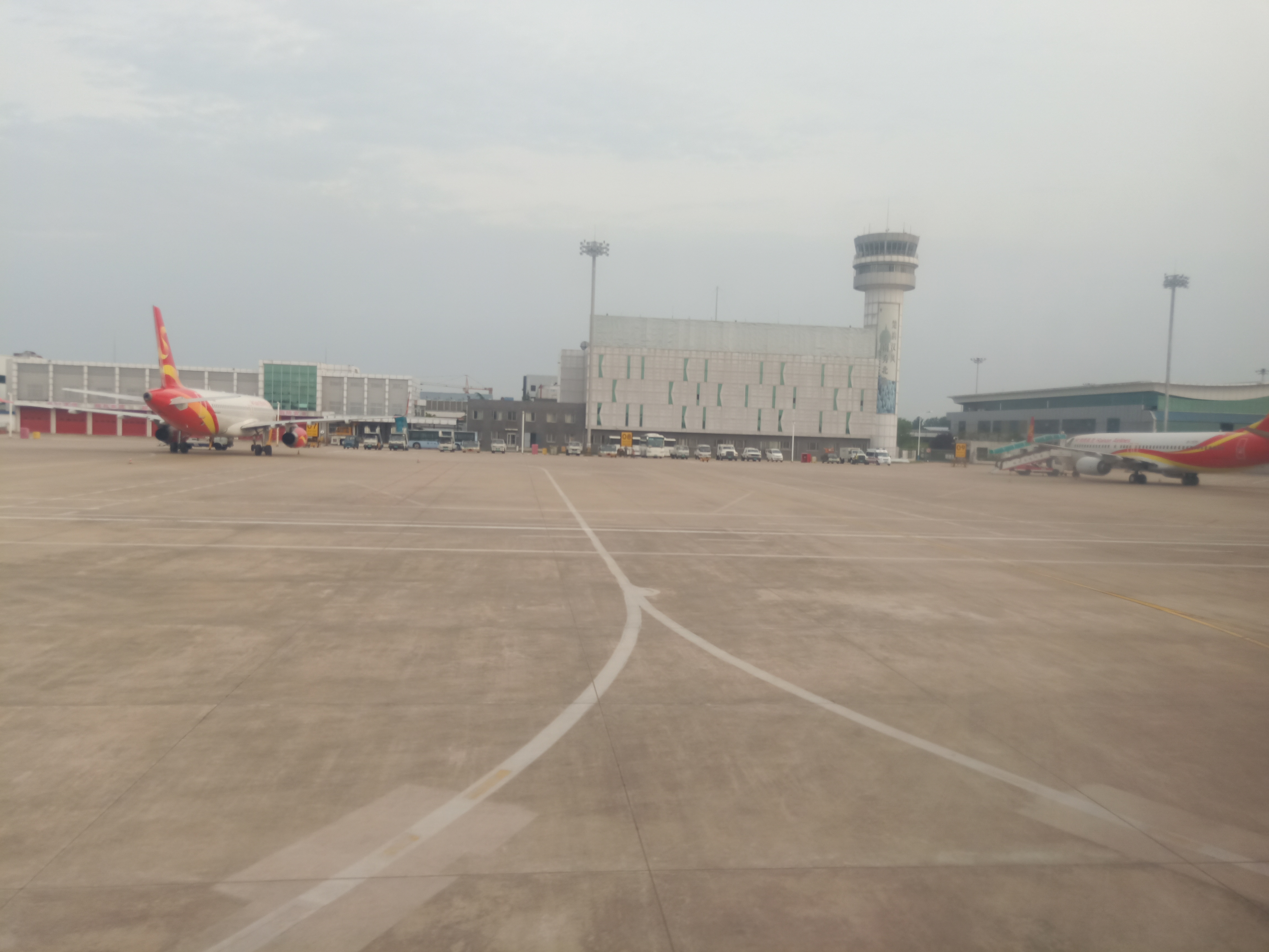 粵語: 徐州觀音國際機場